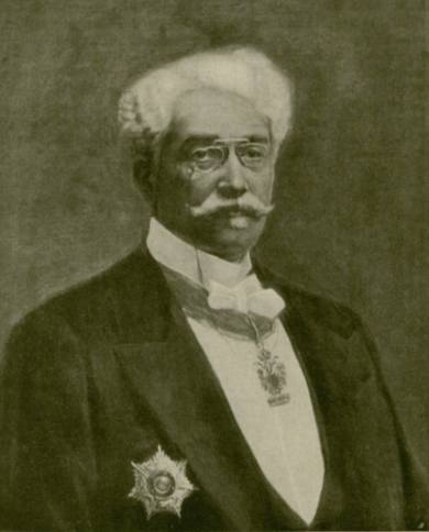 Max von Mauthner (1838 - 1904), Rakousko-uherský průmyslník a politik.